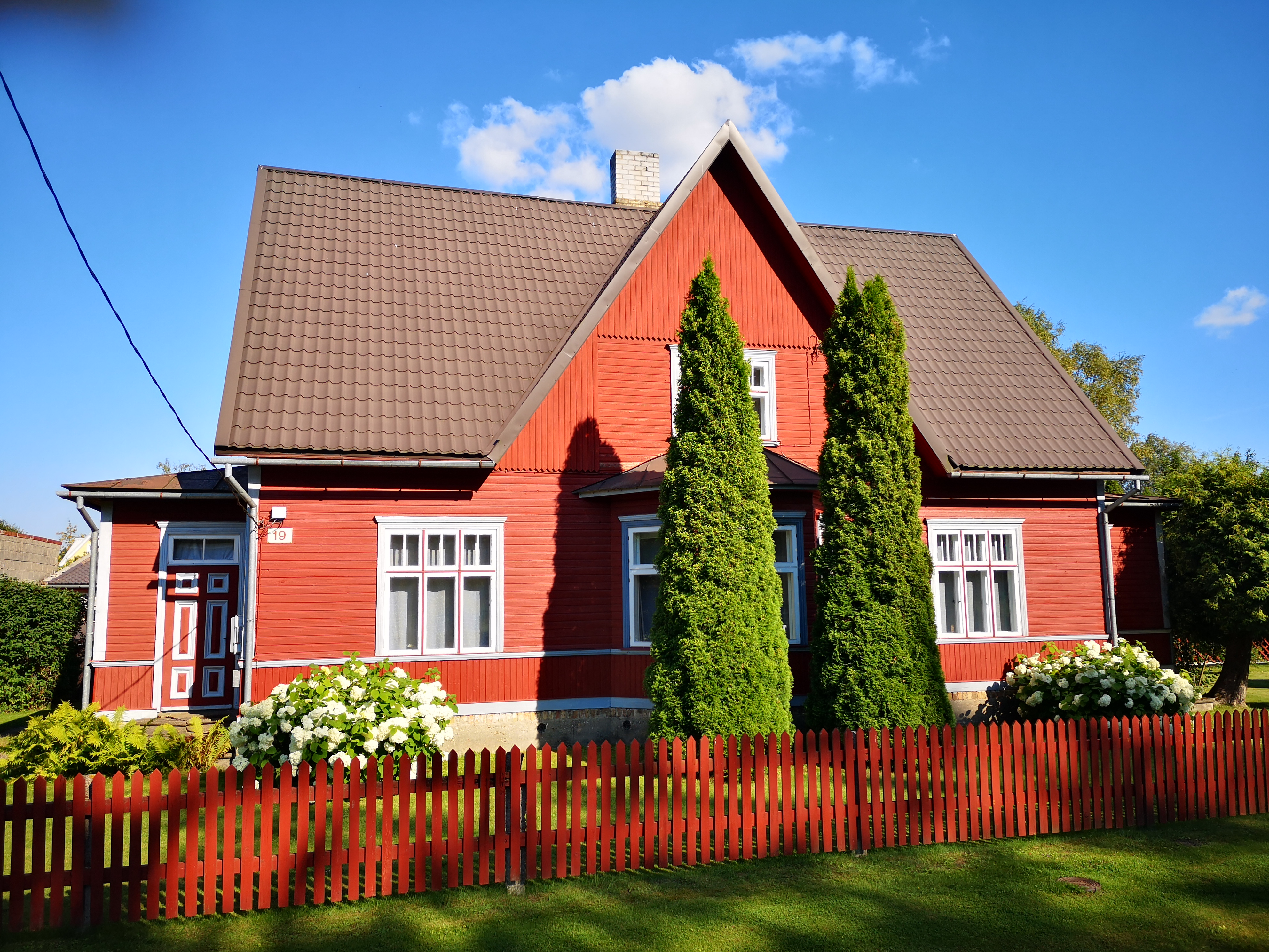 Elamu Sindis Pärnu mnt 19